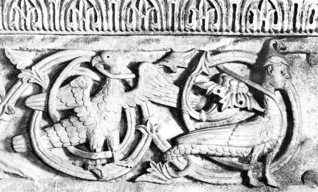 Neobičan detalj sa manastira Studenica.